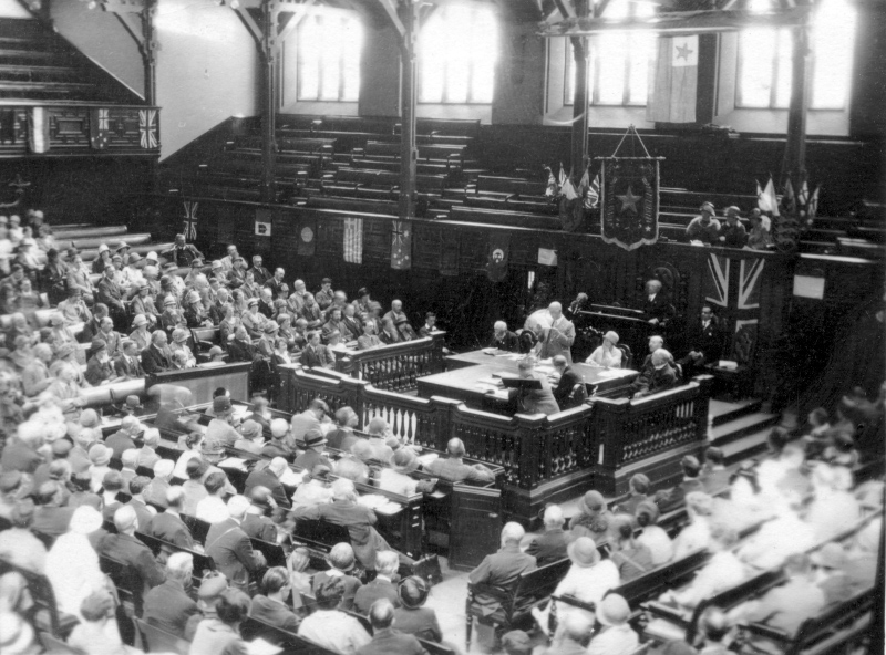 18. Esperanto-Weltkongress, Edinburgh 1926. Feierlicher Schlussakt